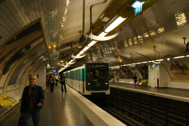 Andenes de la Estación Alésia